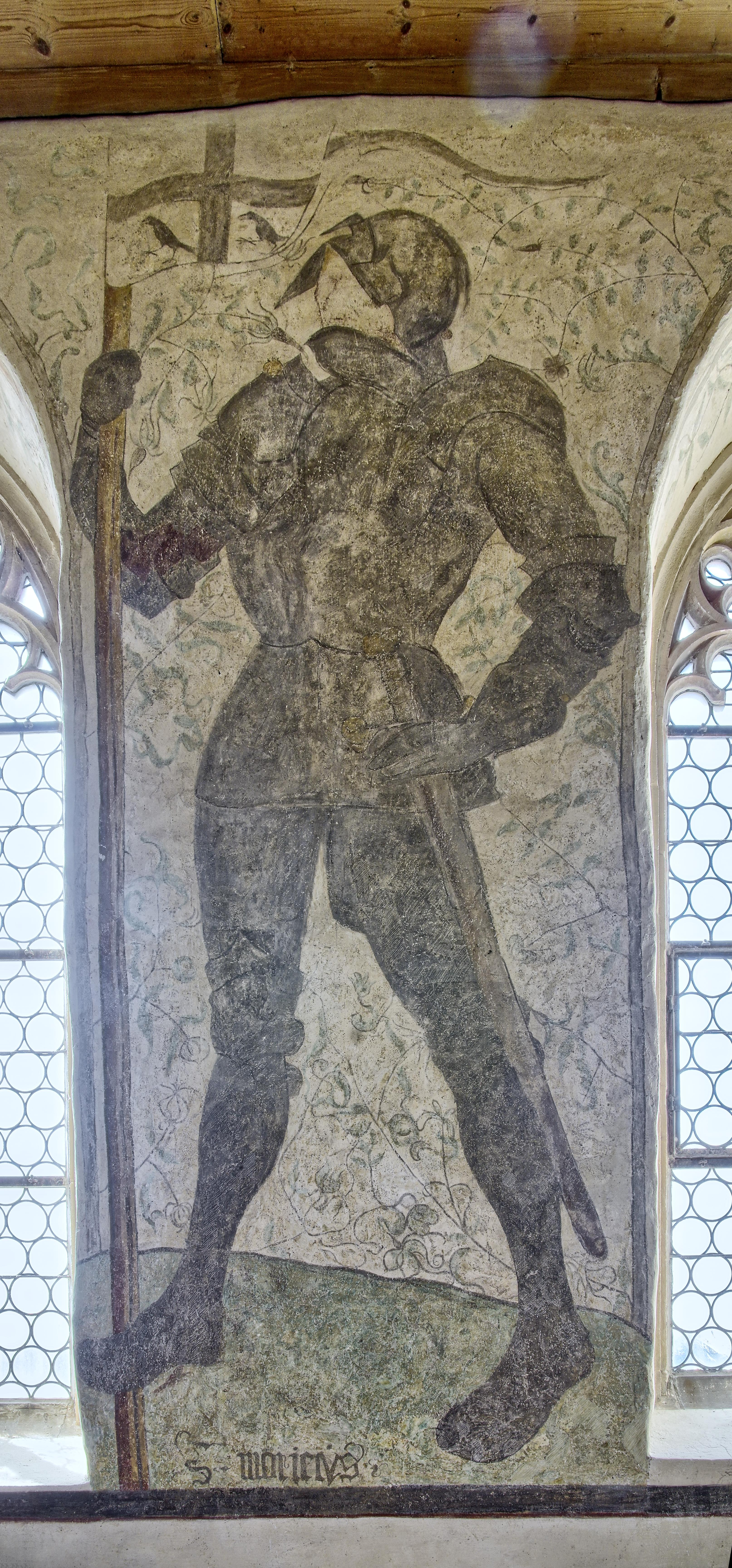 St. Alban in Bötzingen. Sie wurde erbaut um 1480 und war eine ehemalige Kirche des Deutsch-Ordens. Im Volksmund wird sie Peschdkirche genannt. Im Innern sind einige kunstgeschichtliche Kleinode Die katholische Kirche St. Alban in Bötzingen Oberschaffhausen Bilder aus dem Inneren Wandbemalung. St Mauritius